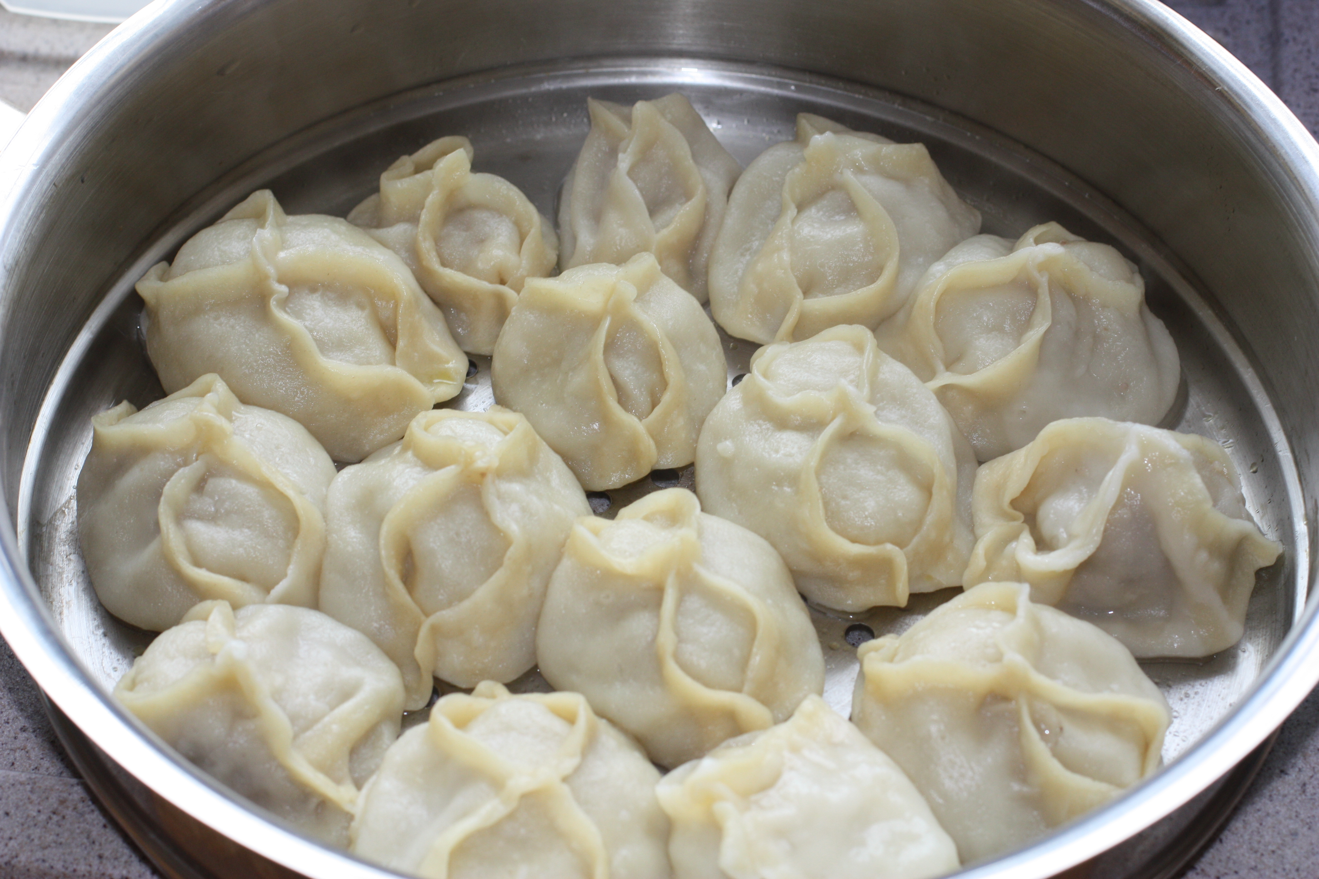 Manti, hausgemacht, eingefroren, im speziellen mehrstöckigen Dampftopf (Manti-Topf), mit scharfer roter Soße.